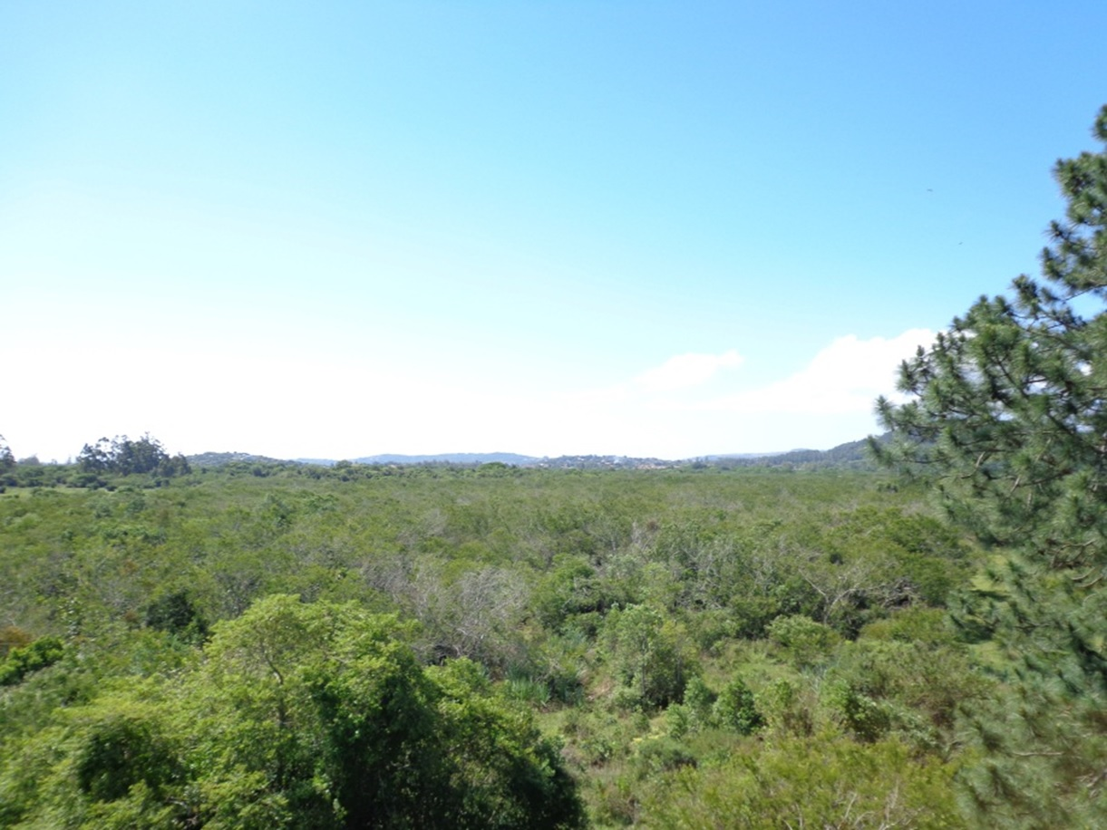 Área de Preservação Permanente do terreno de 29,1 hectares da antiga Estação Transmissora da Rádio Farroupilha, no bairro Ponta Grossa em Porto Alegre -RS